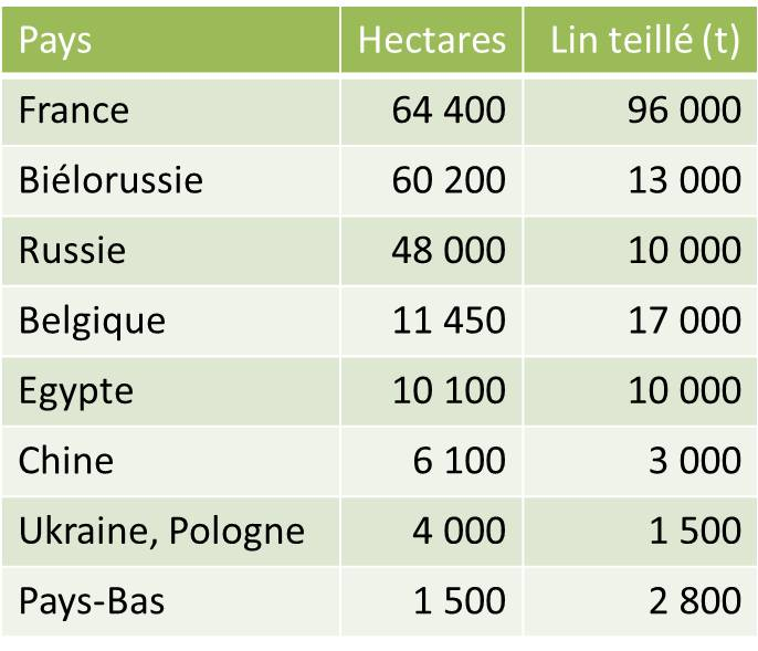 Détail de la production mondiale (2012).